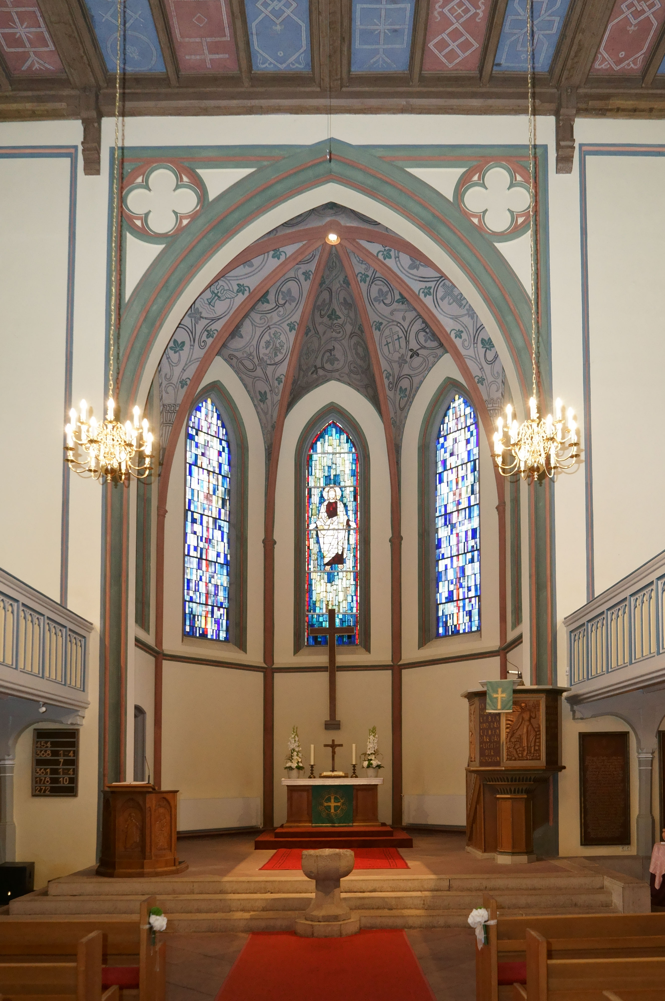 St. Johann in Bremen, Oberneulander Landstraße 41. Chor mit ChristusfensterDas abgebildete Objekt ist ein geschütztes Kulturdenkmal in der Freien Hansestadt Bremen, mit der Nr. 1234 beim Landesamt für Denkmalpflege registriert.